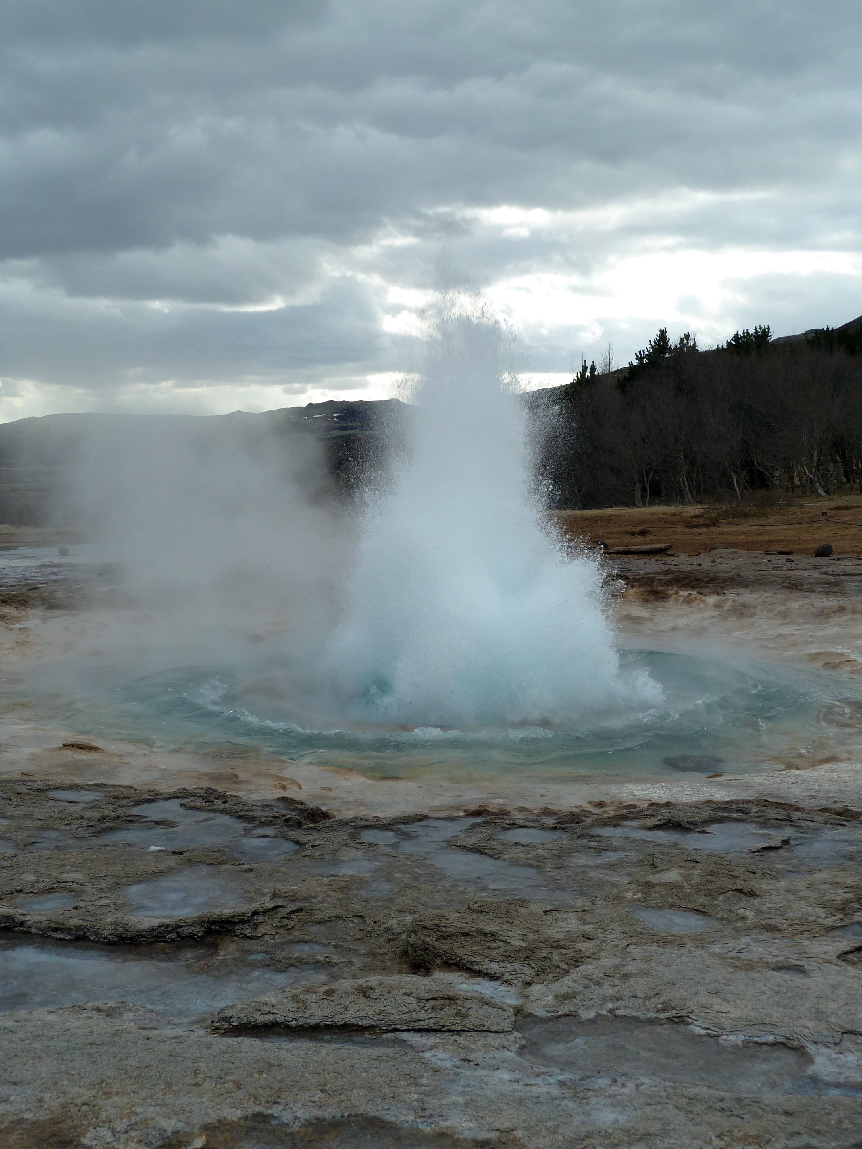 Strokkur geyser, Haukadalur